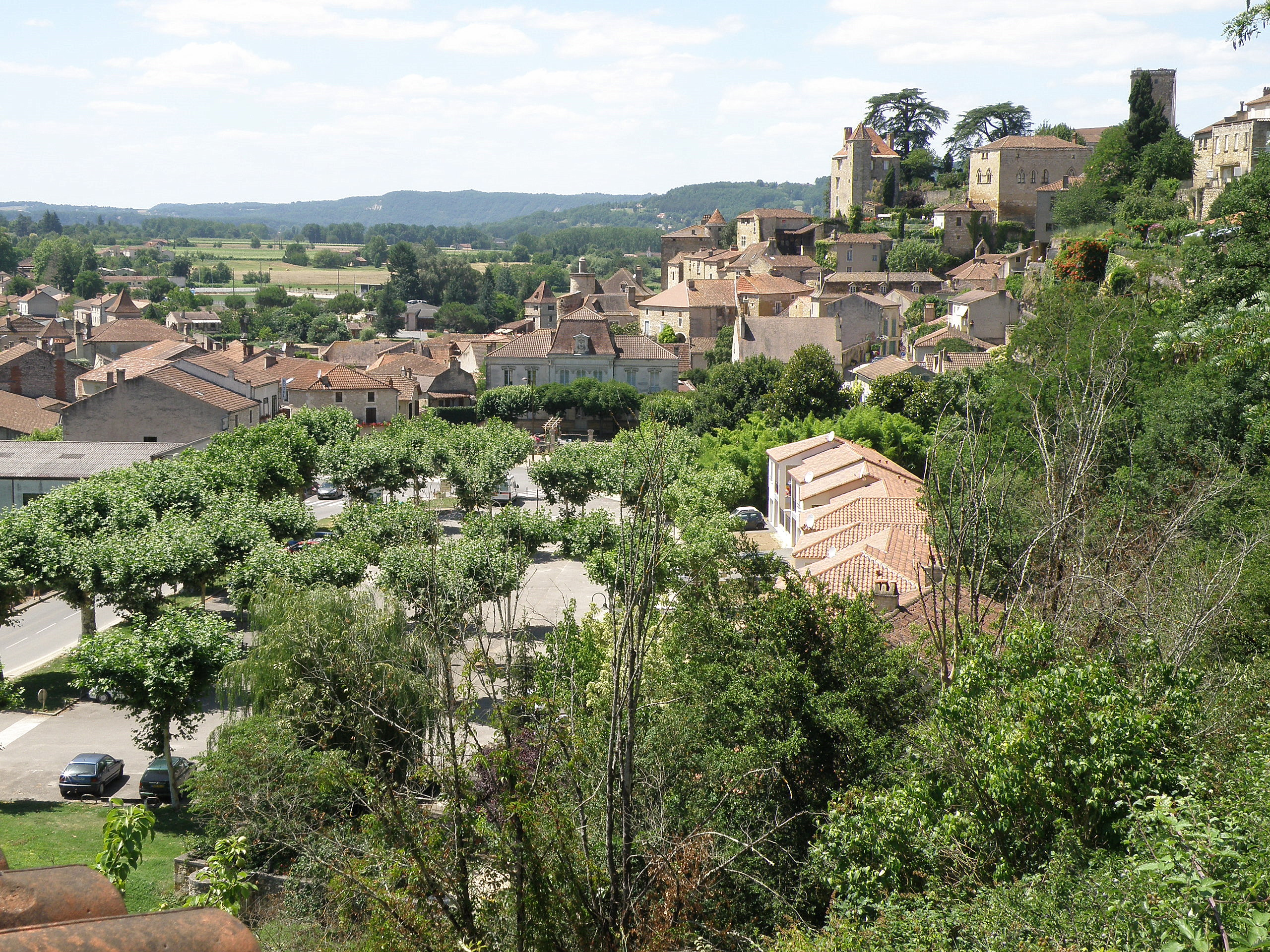 Puy-l’Évêque, commune située dans l’extrême sud-ouest du dép. du Lot (région Midi-Pyrénées, France). Vue générale de la localité. Coup d'œil vers l'ouest-nord-ouest. On aperçoit en haut à droite la silhouette rectangulaire du donjon, vestige de l'ancien palais épiscopal.